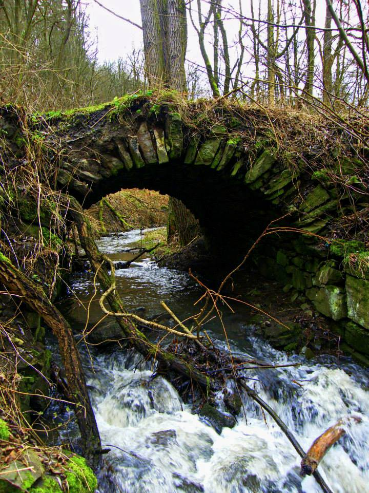 Kamenný mostek v zaniklé osadě Hrzín na úpatí Doupovských hor. Stav v roce 2016